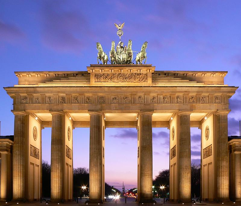 Brandenburger Tor in Berlin